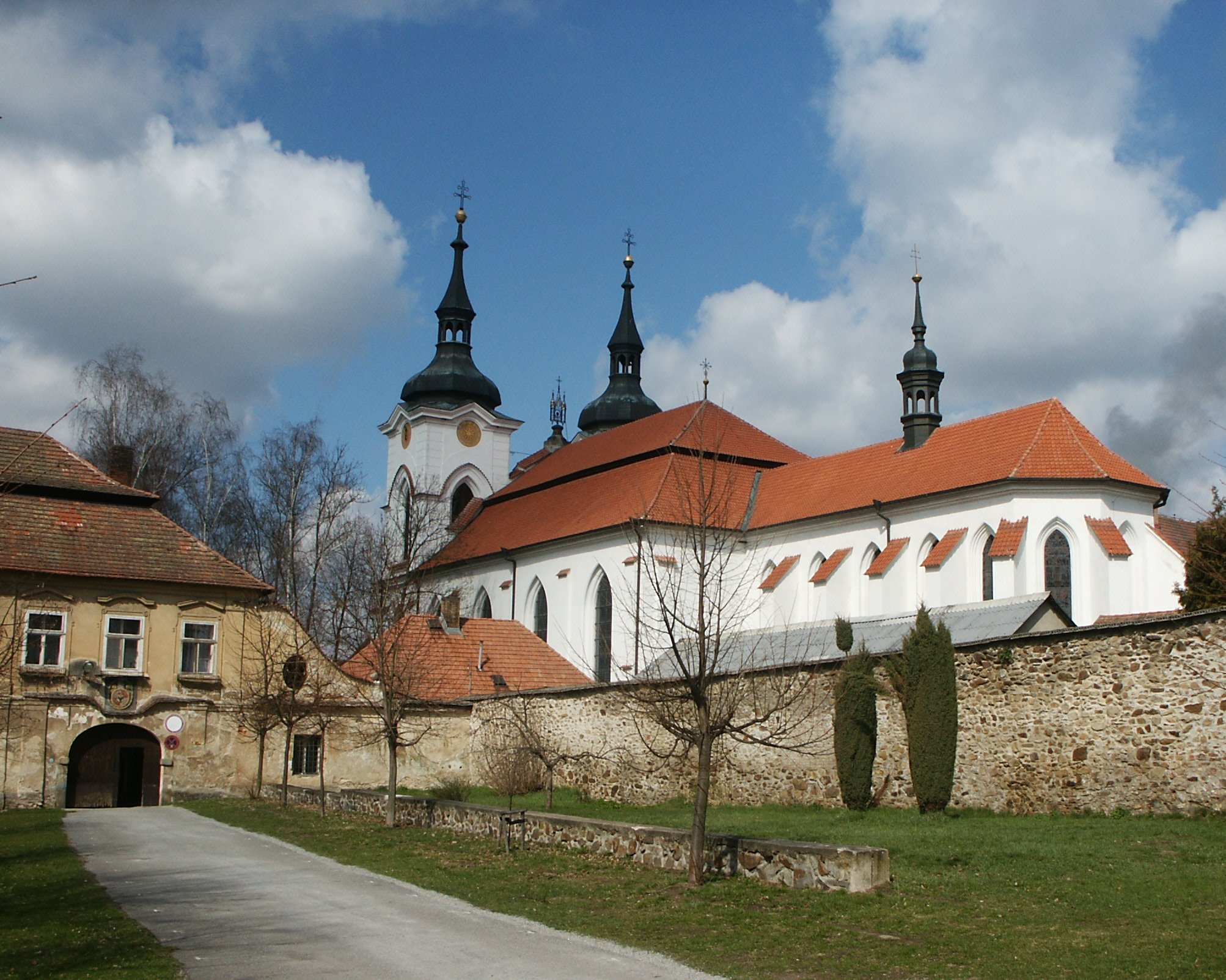 Klášter premonstrátů s kostelem Narození P. Marie, Želiv 88 - celkový pohled, jaro 2004